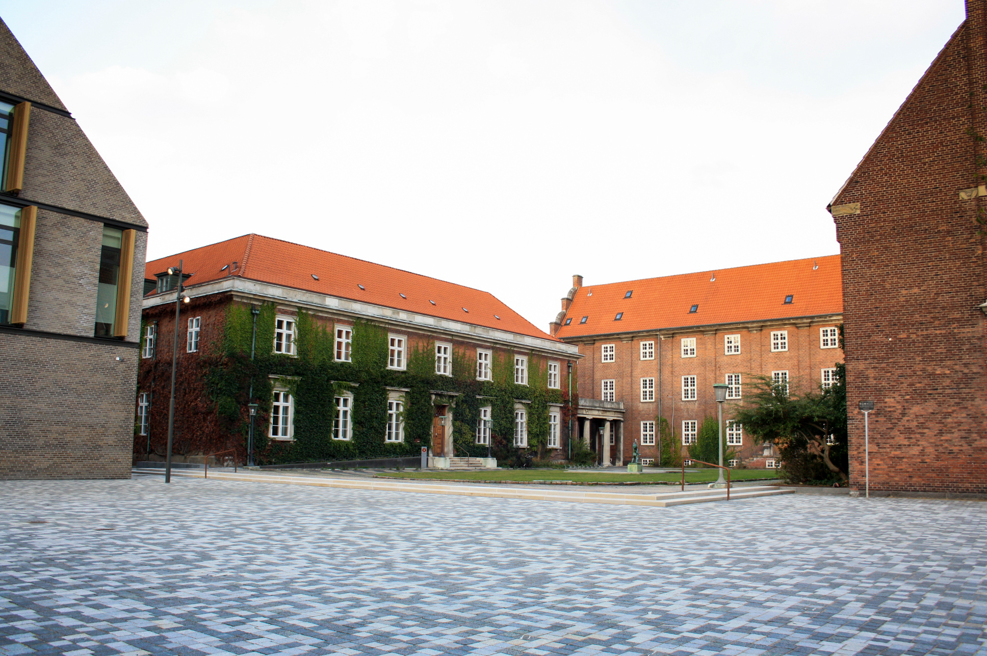 Frederiksberg Domhus